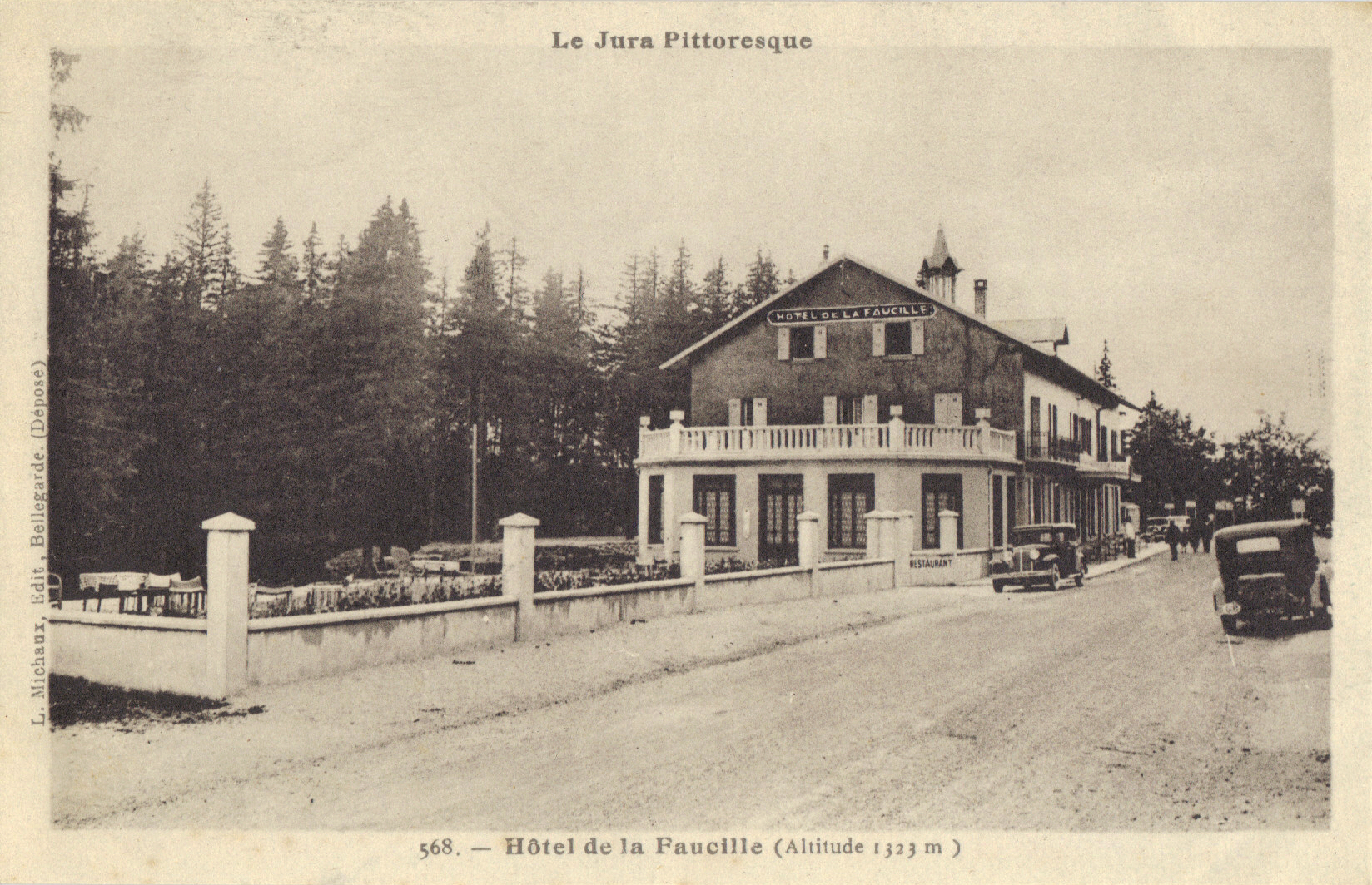 Col de la Faucille, Hôtel